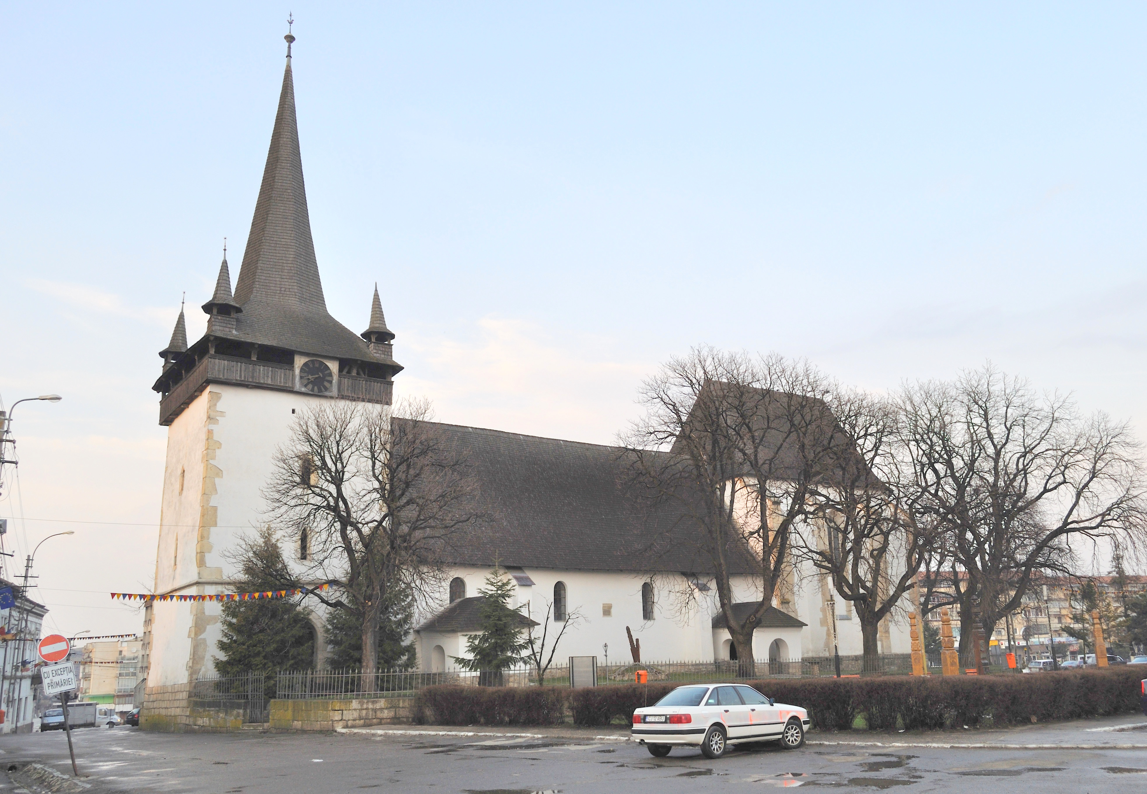 Biserica reformată din Huedin